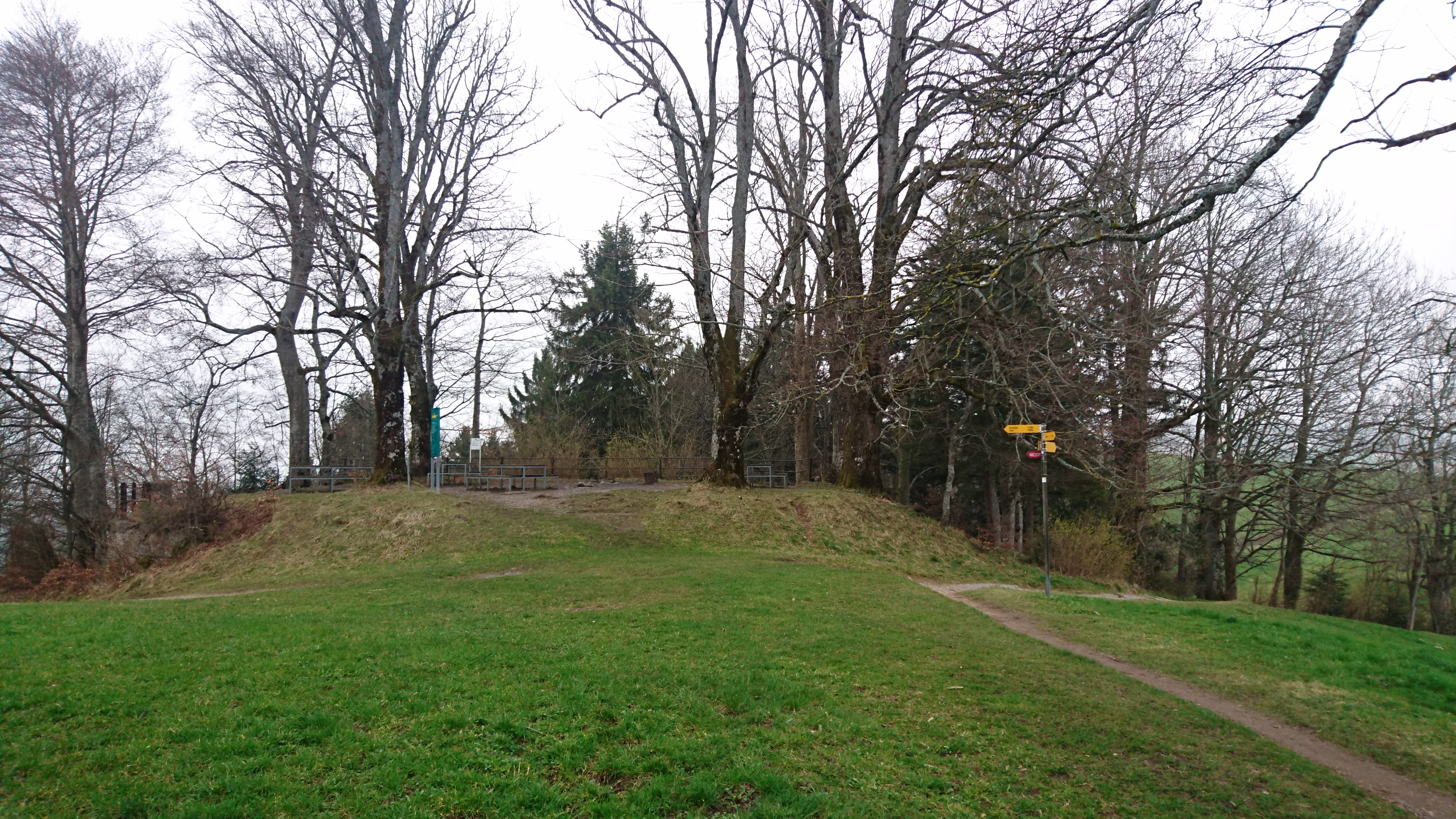 Gipfel des Freudenberges mit Feuerstelle am ehemaligen Standort des Restaurants